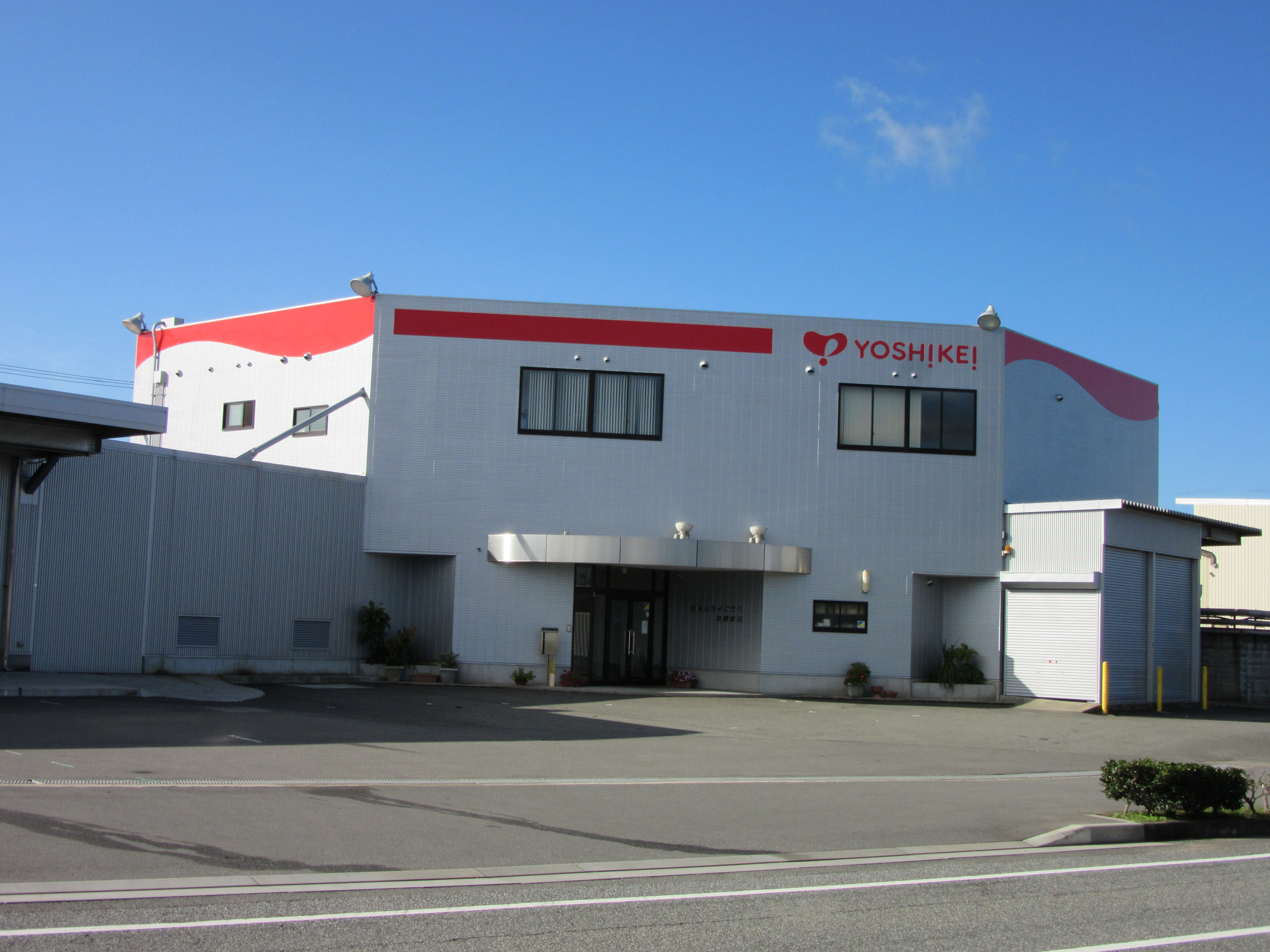 ヨシケイこうべ 小野本社